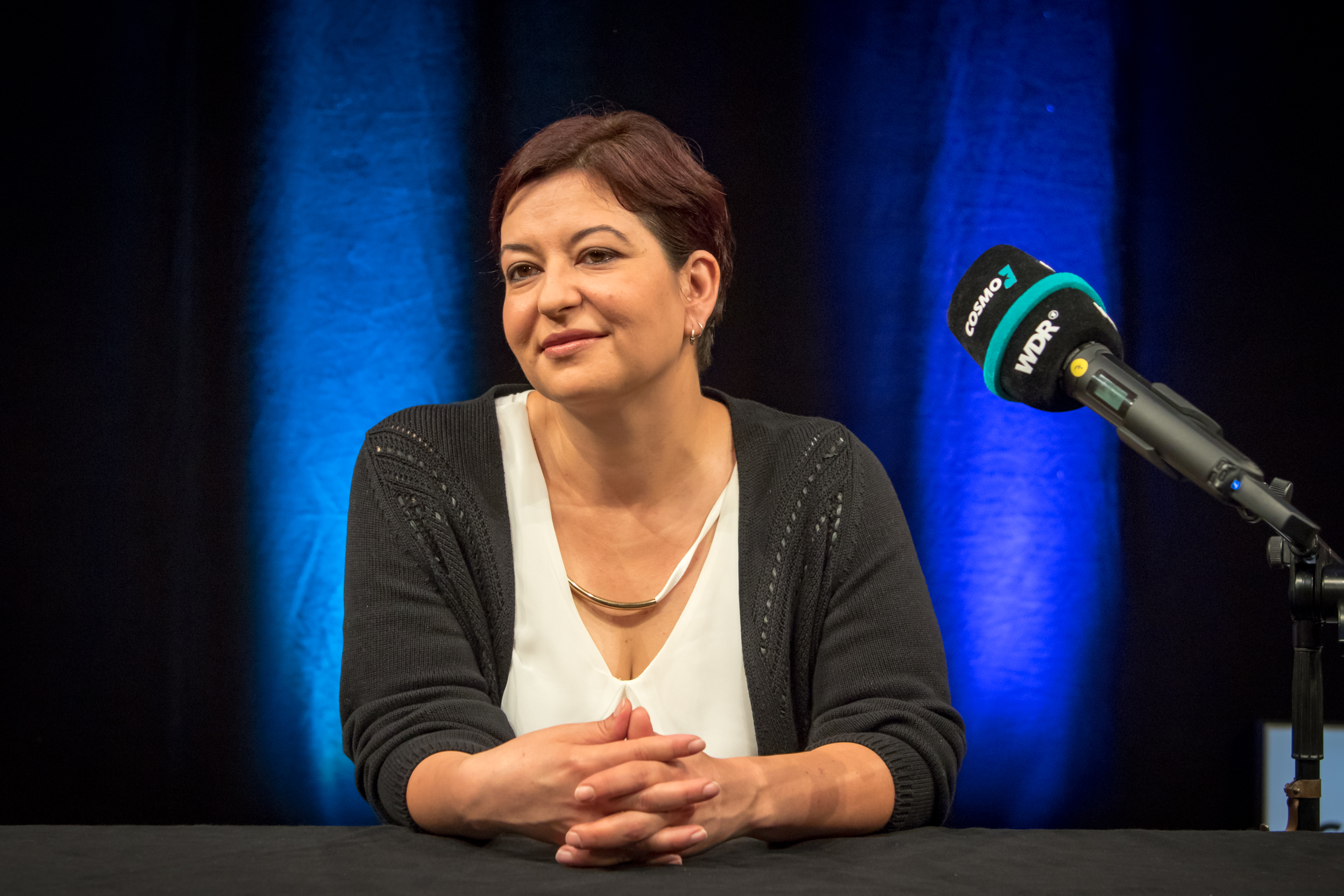 Cosmo - Wir wollen das Meer sehen: Solidaritätsveranstaltung für Deniz Yücel und alle anderen inhaftierten Journalisten gemeinsam mit der Initiative Free Deniz. Ilkay Yücel